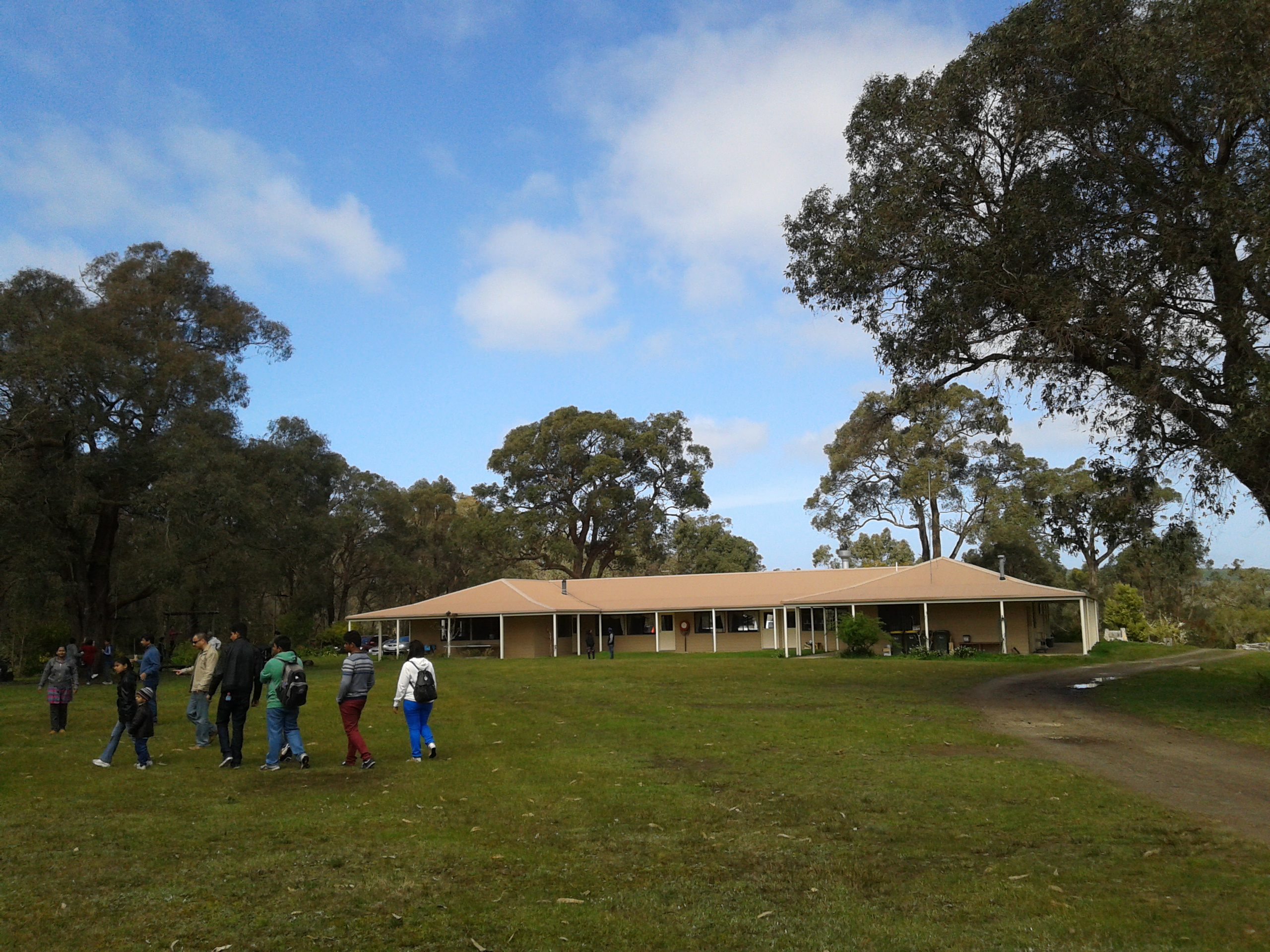 Krishna Vally temple